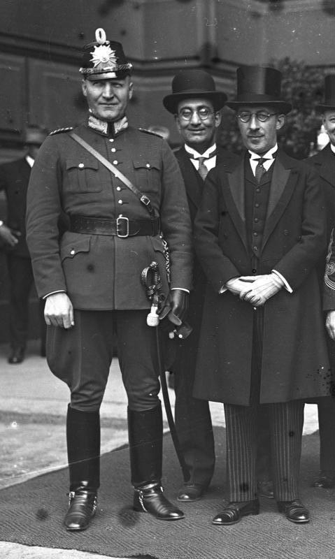 Der Ausnahmezustand in Berlin! Die von der Militärbehörde verhafteten und ihres Amtes enthobenen preussischen Polizeiminister Carl Severing, Albert Grzesinsky, Dr. Bernhardt Weiss und Kommandeur Magnus Heimannsberg. Polizei- Vizepräsident Dr. Weiss (rechts) und der Kommandeur der Schutzpolizei Heimannsberg (links) welche verhaftet wurden. Information added by Wikimedia users.Berlin